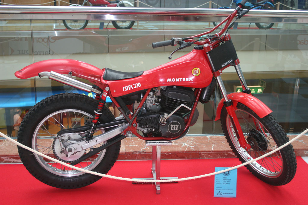 Montesa Cota 330, 1984 327,80 cc.